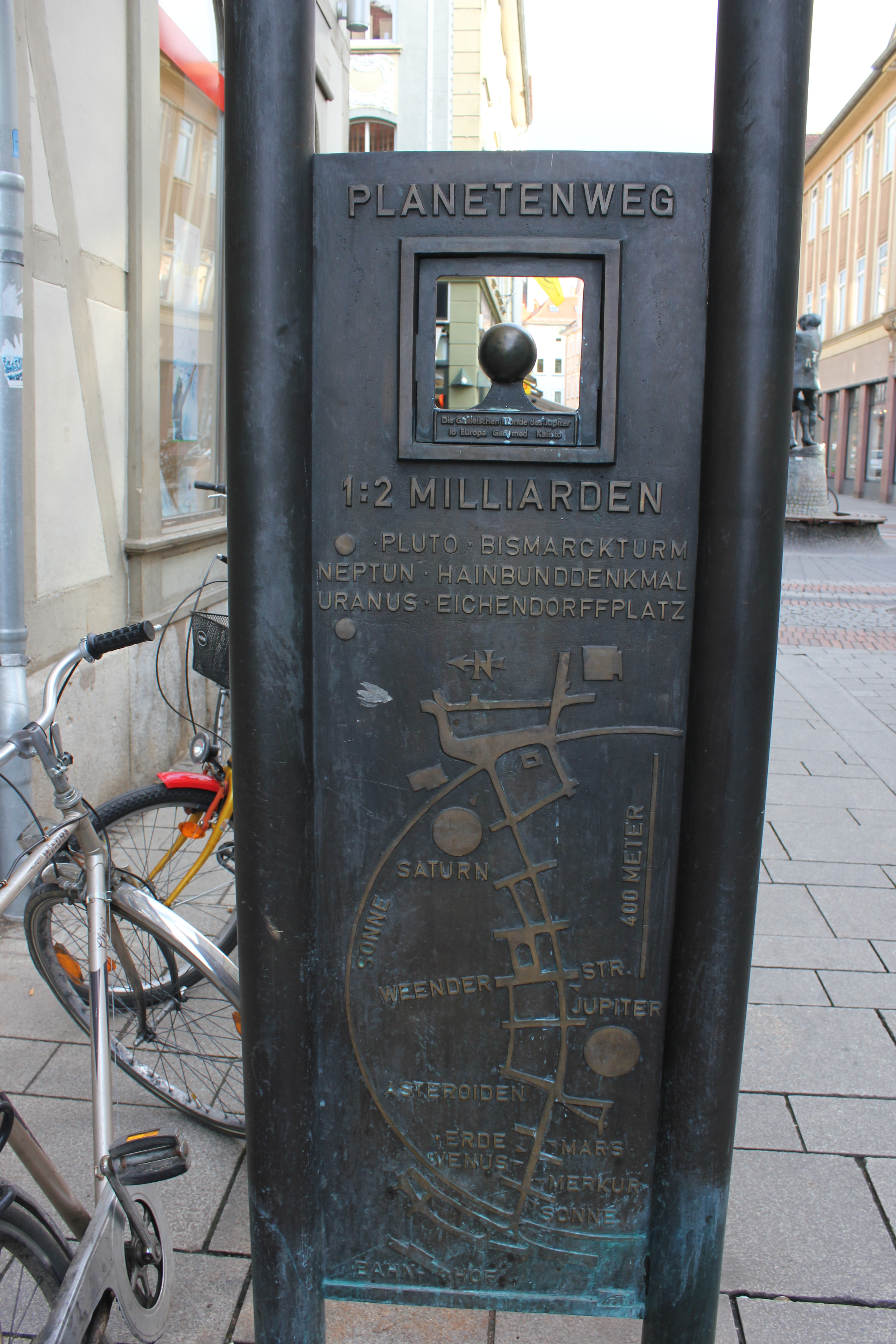 Reinhold Wittigs Planetenweg in Göttingen - Bronze gegossene Stele - Die Galileischen Monde des Jupiter Io Europa Ganymed Kallisto